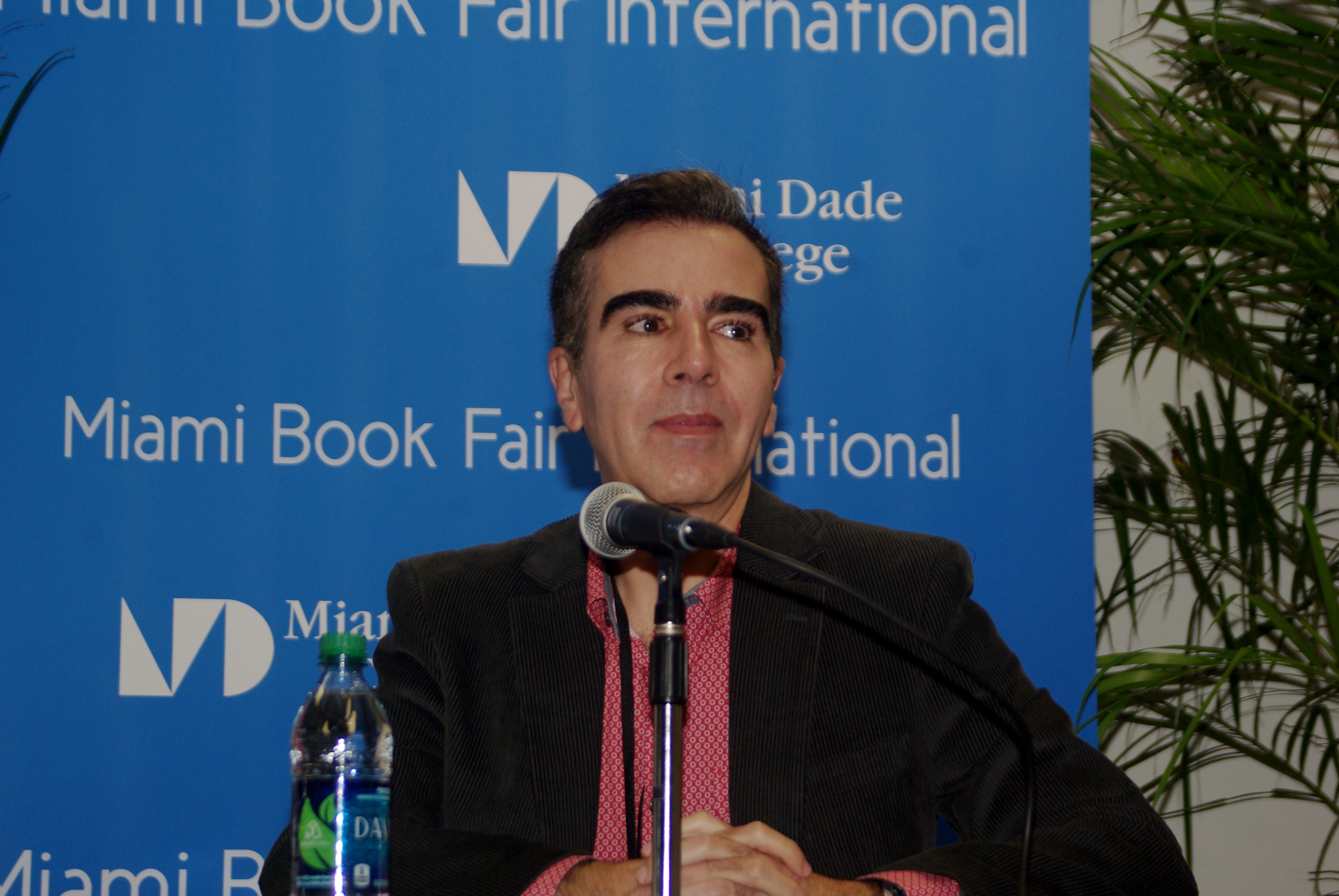 El escritor colombiano Jorge Franco en la Feria Internacional del Libro de Miami, 2014